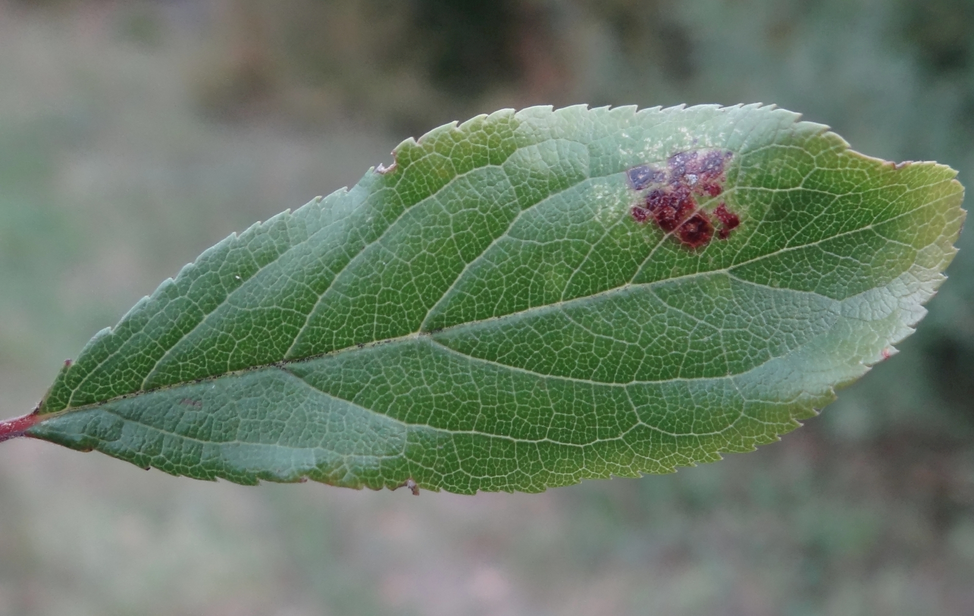 Polystigma rubrum on Prunus spinosa. Location: Poland, Trzciana, woj. małopolskie